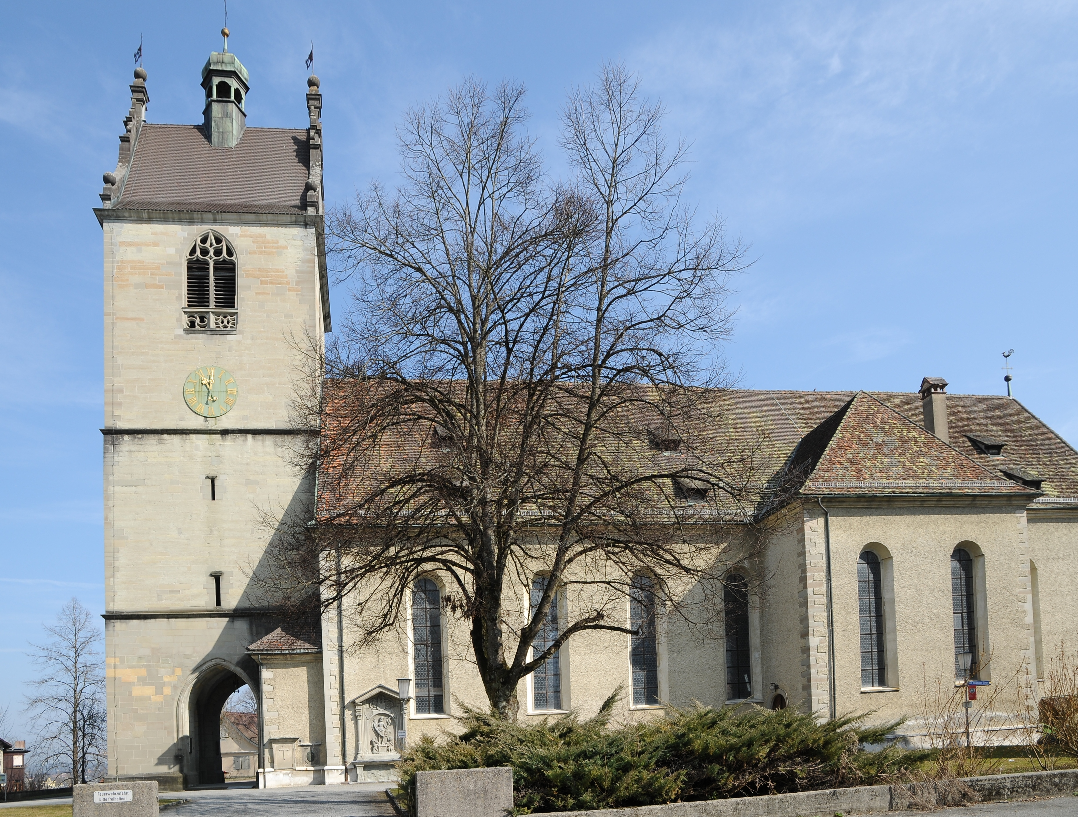 Stadtpfarrkirche St. Gallus in der Oberstadt von Bregenz